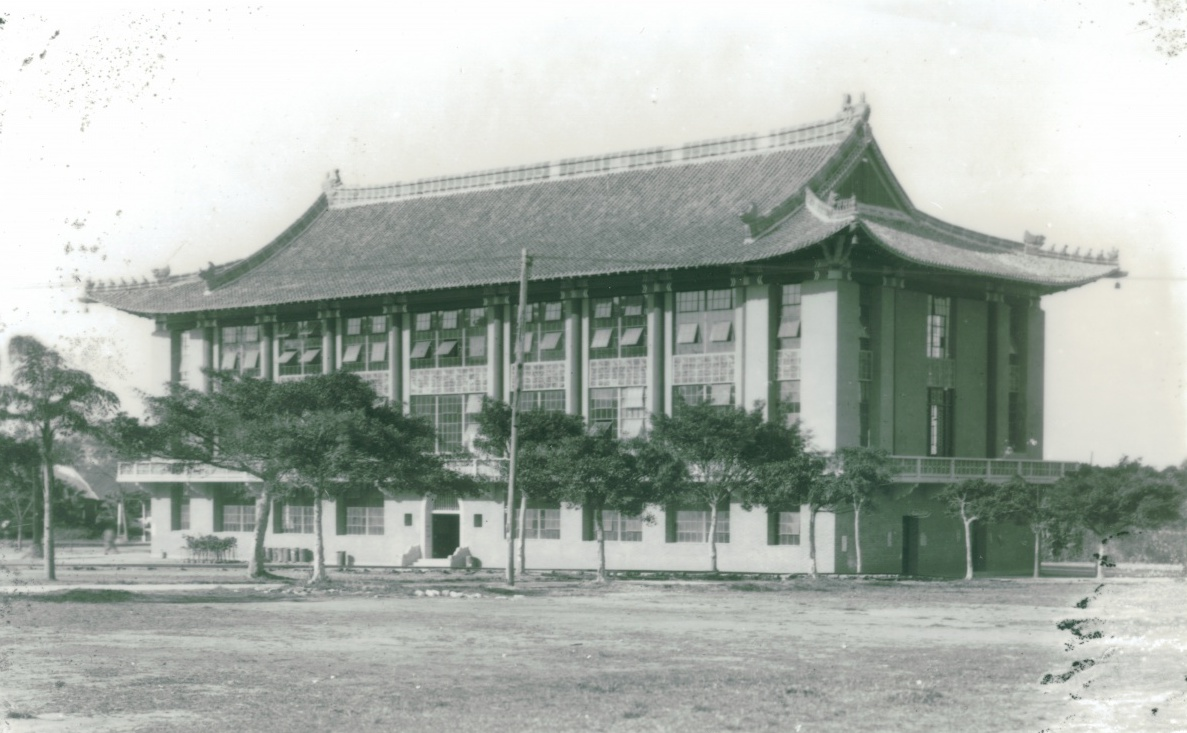 1931年岭南大学哲生堂